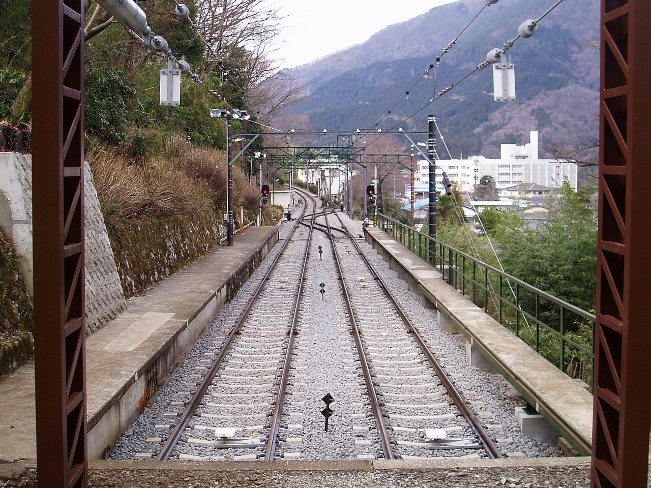 箱根登山鉄道 上大平台信号場 フェンスの外から撮影 2007.03.08 投稿者が撮影 Category:鉄道駅画像 Category:箱根登山鉄道の画像